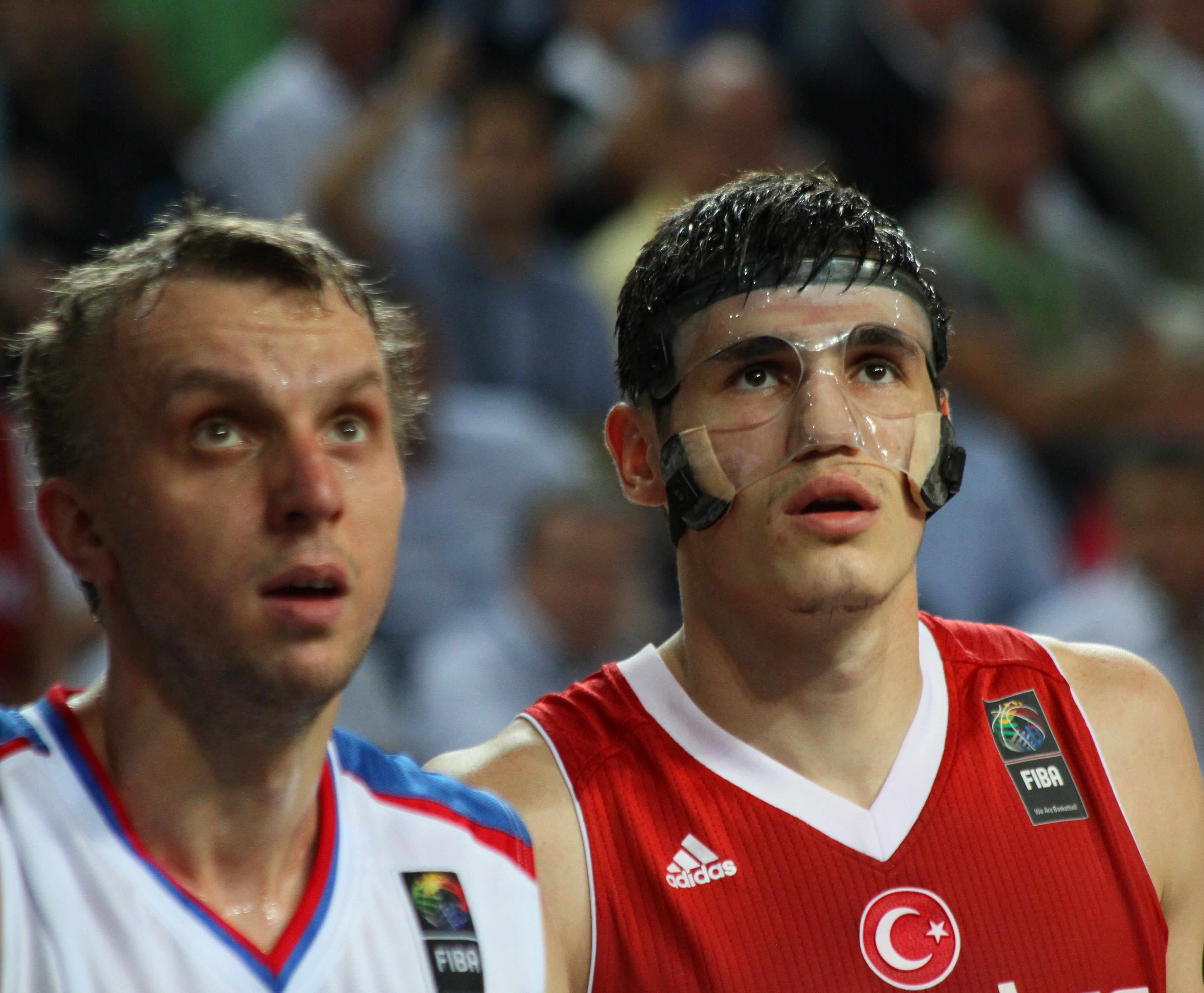 IMG_4633_2